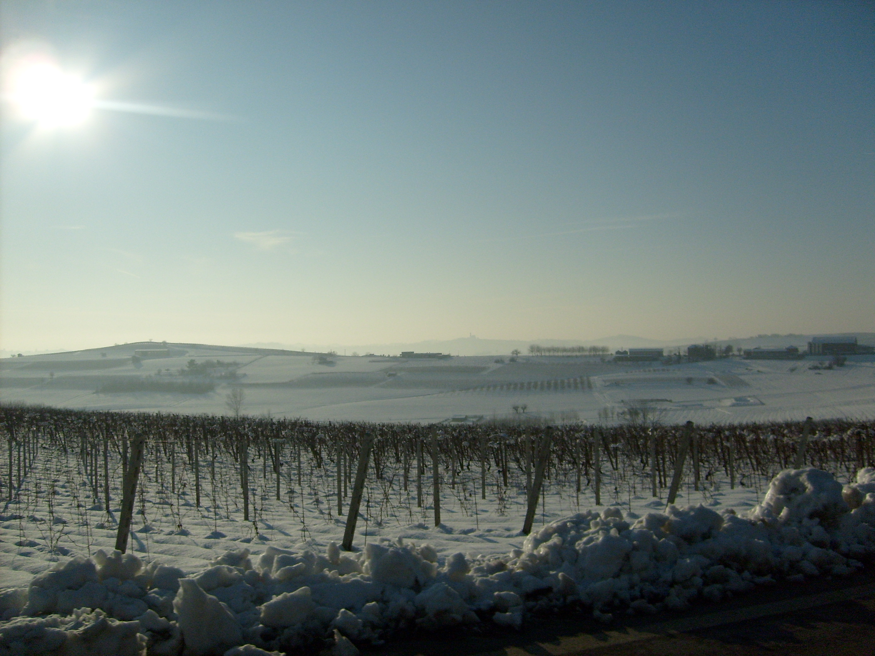 Vigna dopo nevicata